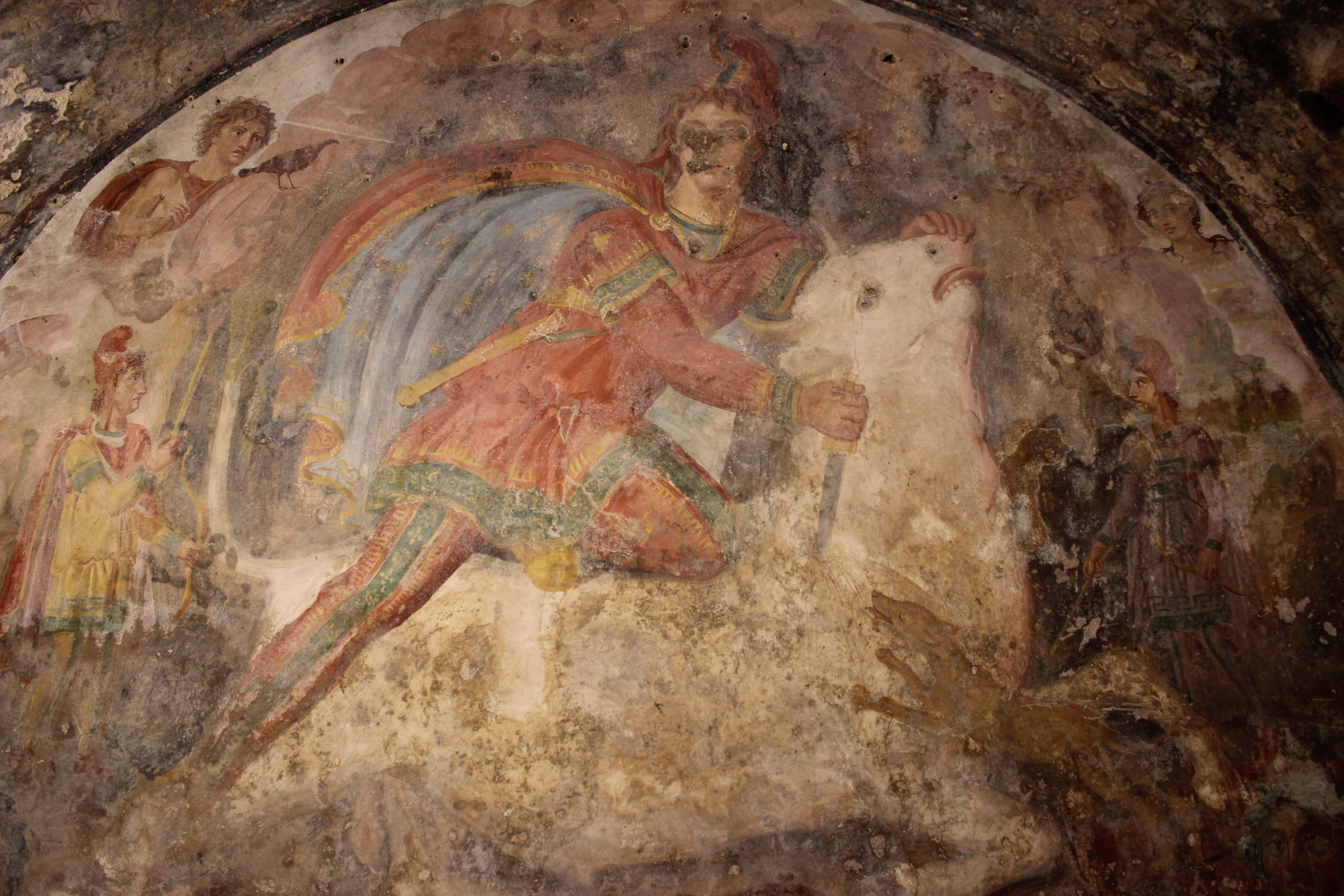 Santa Maria Capua Vetere. Mitreo, fresco con Mitra sacrificando el toro.